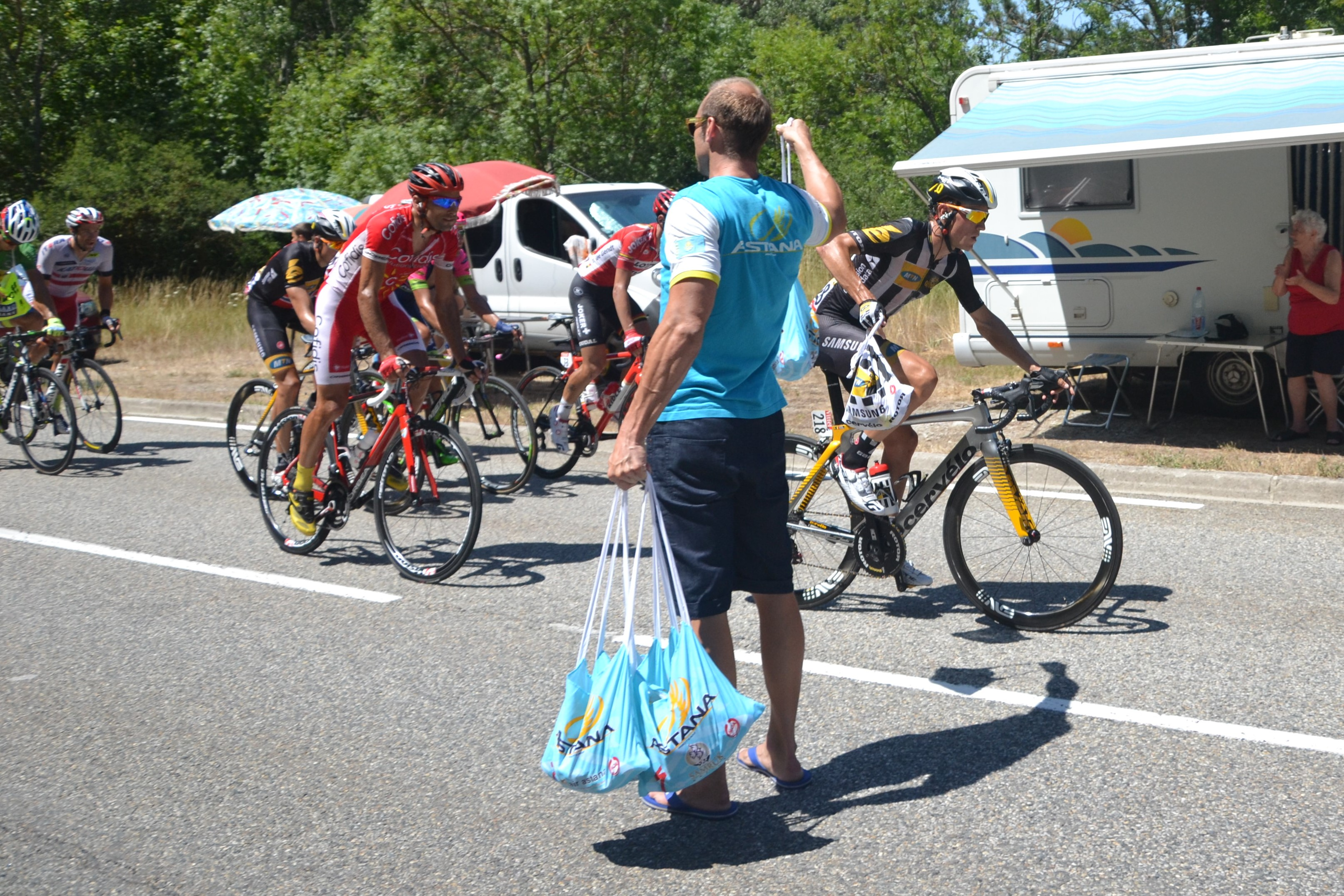 Durant la 16ème étape du Tour de France 2015